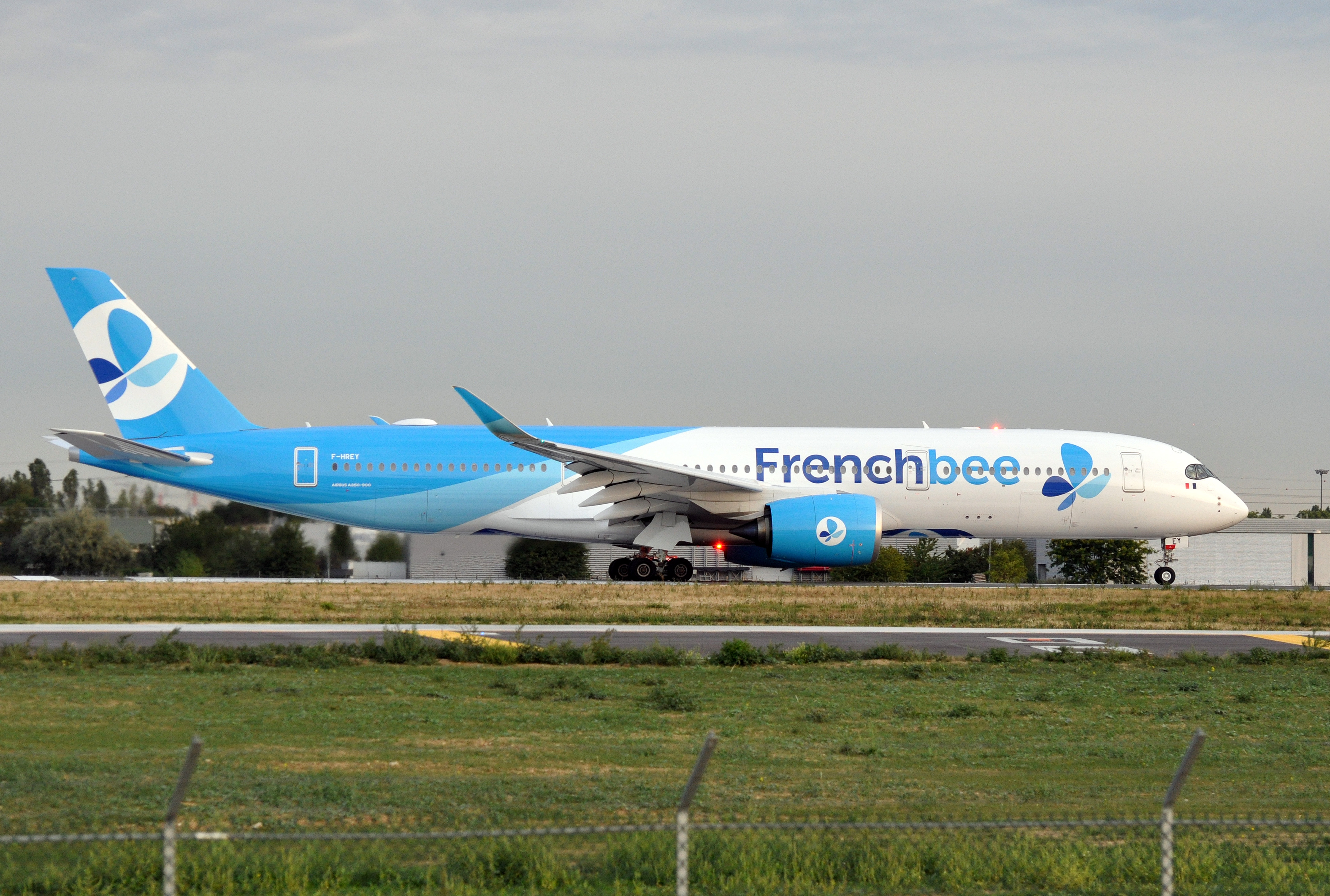 MSN 325 A350-941 / A350 / A350-900 FRENCH BEE ORY AIRPORT